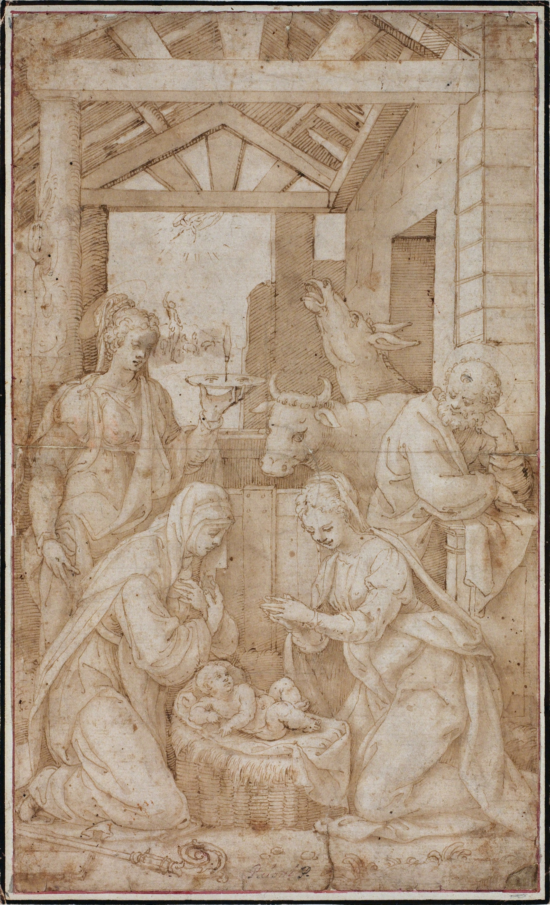 Giulio Campi: Adorace narozeného Krista se sv. Lucií (1535-1540), kresba perem lavírovaná štětcem na papíře, 315x192 mm, Národní galerie v Praze